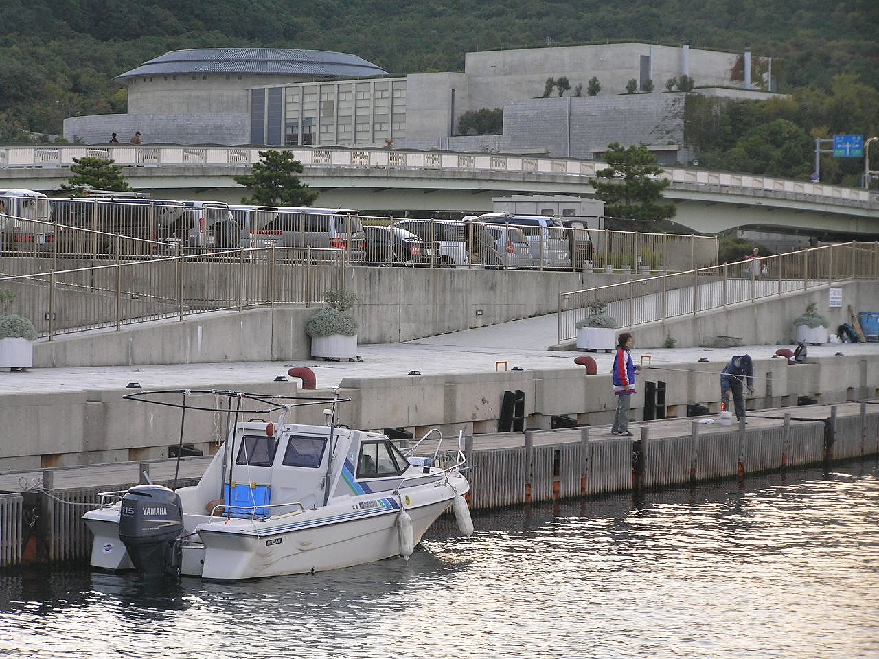 北緯/34度33分15秒 東経/135度 0分54秒 あわじ交流の翼港海の駅（あわじこうりゅうのつばさうみのえき）は、兵庫県淡路市大字楠本字ユスノ木にある海の駅。